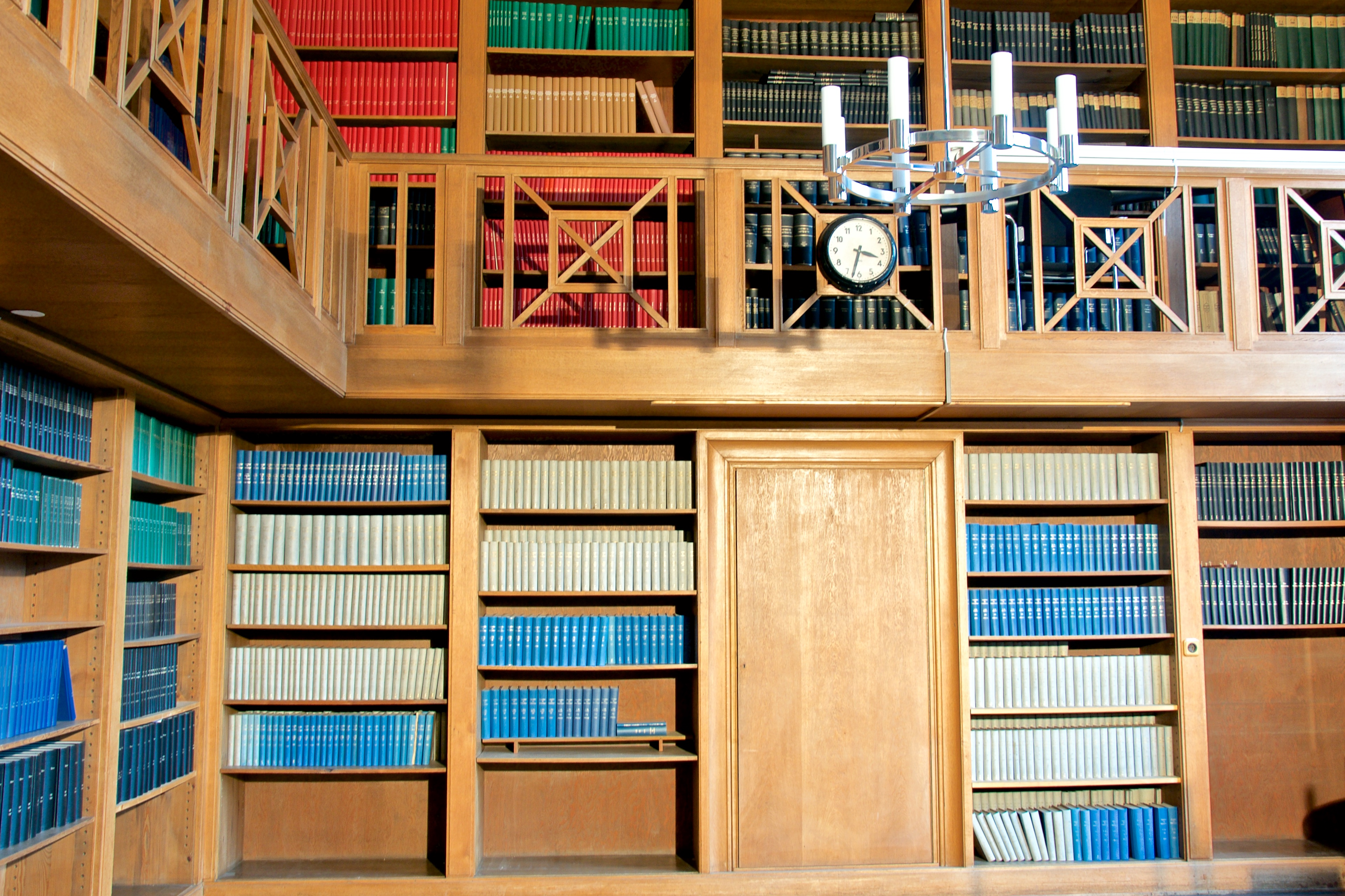 Bücherregale und Galerie